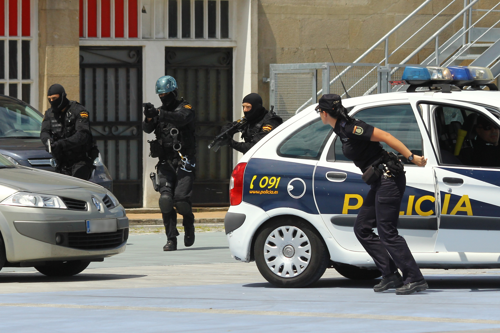 Del 22 al 28 de junio de 2012 se celebran en Vigo unas Jornadas Policiales, que incluyen una exposición del Cuerpo Nacional de Policía en la Estación Marítima de la ciudad. Las Jornadas se iniciaron con un simulacro de operación antiterrorista en el muelle de la Estación Marítima. El simulacro contó con la participación de tres miembros del Grupo de Operaciones Especiales y Seguridad (GOES) de Galicia, coches patrulla, el helicóptero de la Policía basado en el Aeropuerto de Peinador (que llevó en su puerta de babor a un tirador de élite del GOES para apoyar la operación), una unidad de guías caninos y agentes del Grupos de Desactivación de explosivos y NRBQ, con un vehículo de desactivación. Vigo Police Conference, 22-28 June 2012 From 22th to 28th June 2012 held a Police conference in Vigo, including an exhibition of the National Corp of Police in the Maritime Station of the city. The conference began with a simulation of anti-terrorist operation in the dock of the ferry terminal. The simulation was attended by three members of the Special Operations and Safety Group (GOES) of Galicia, patrol cars, the police helicopter based at the Peinador Airport (carrying an elite shooter of the GOES to support the operation), a unit of dog handlers and agents of the Explosive Ordnance and NRBQ Group, with a deactivation vehicle.